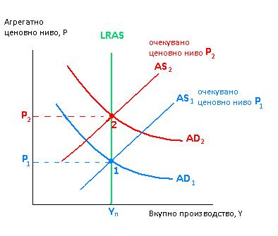 Експанзивната политика ја поместува кривата на агрегатната побарувачка до AD2, но поради тоа што оваа политика е очекувана, краткорочната крива на агрегатната понуда се поместува налево до AS2. Економијата се придвижува до точката 2, каде што стапката на вкупно производство е сѐ уште на ниво на природна стапка, но ценовното ниво расте до P2.